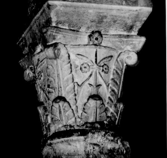 Capitello del tipo romano corinzieggiante a lira, ma con semplificazioni geometrizzanti.